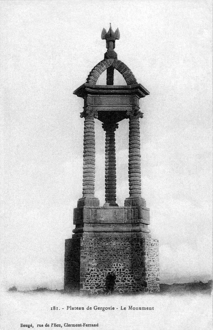 Carte postale noir et blanc des années 1900, éditée par Bougé à Clermont-Ferrand. Représente le premier état du monument de Gergovie ou monument commémoratif à Vercingétorix construit en 1900 sur le plateau de Gergovie dans le département français du Puy-de-Dôme.